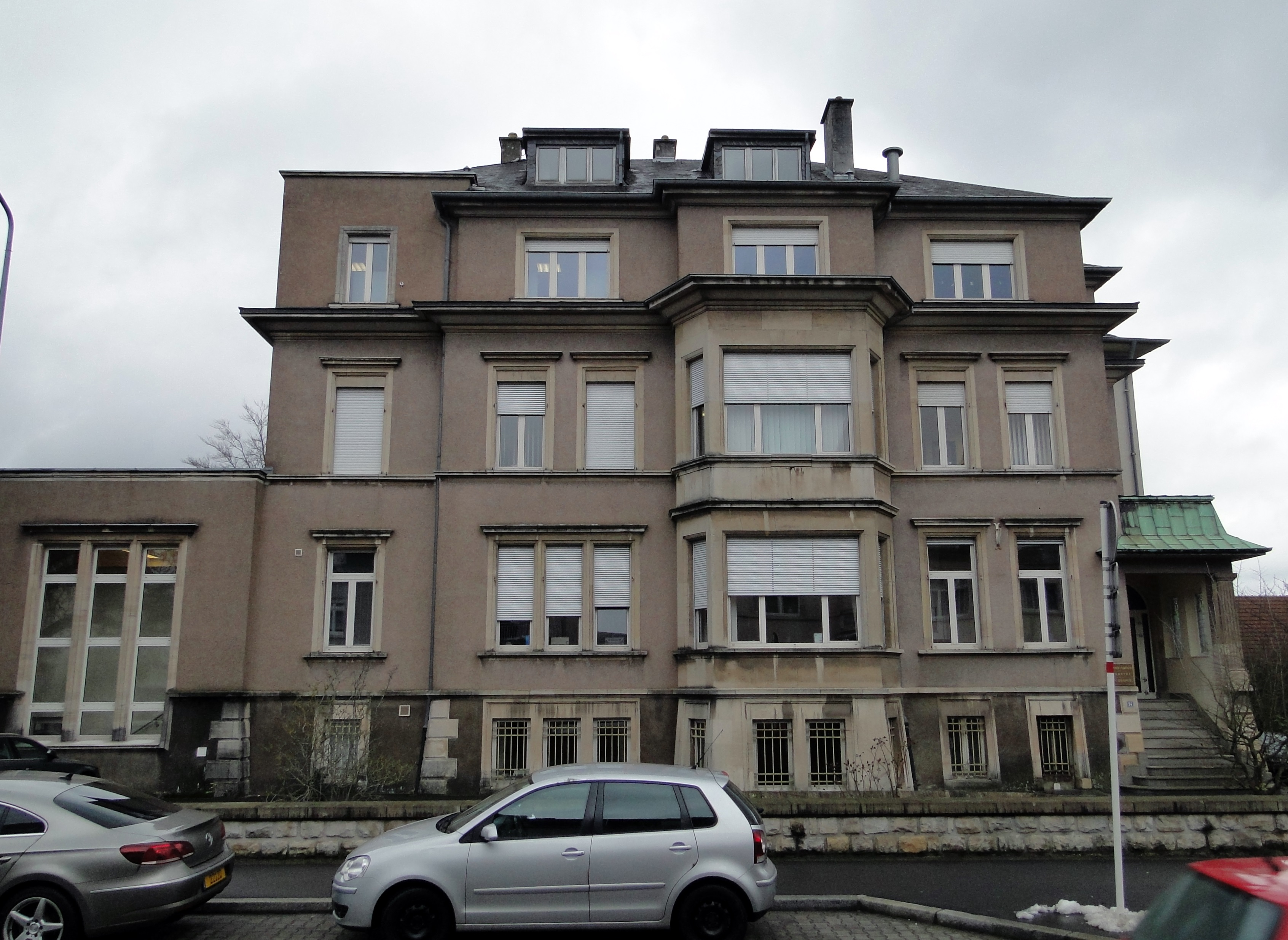 Ancienne "Villa Leclerc", construite vers 1906 pour le compte de Nicolas Leclerc. L'immeuble qui a été modifié au cours des années abrite depuis 1948 la direction de l'administration du cadastre et de la topographie ainsi que la Division du Laboratoire de Médecine vétérinaire.